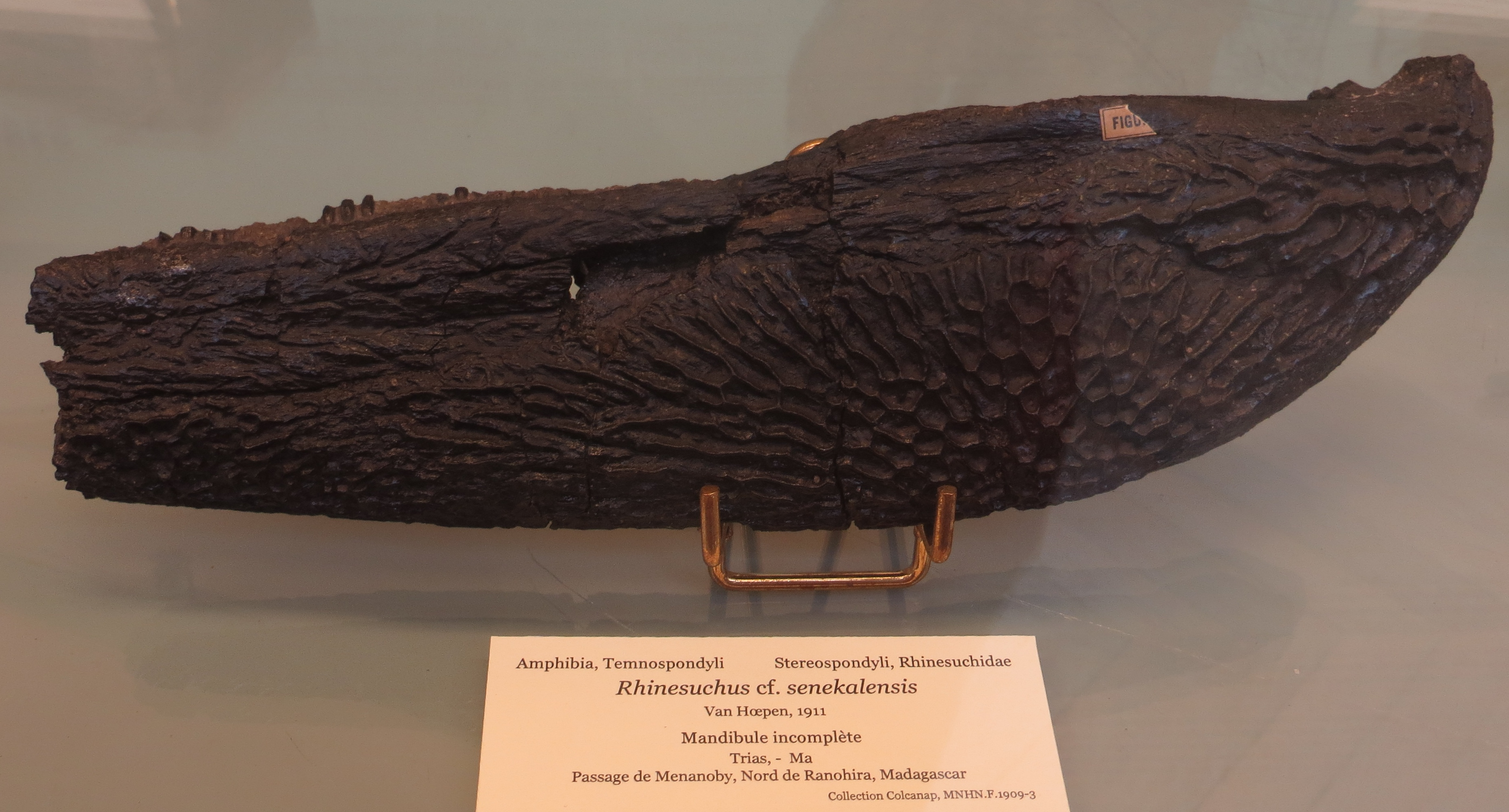 Rhinesuchus fossil